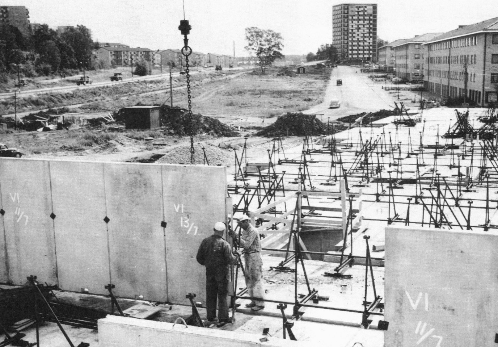 Ett av Sveriges första prefab-byggen i Grimsta